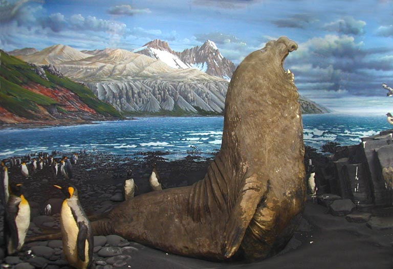 diorama rappresentante un elefante marino (Mirounga leonina) circondato da Pinguini reali. Conservato al museo civico di storia naturale di Milano